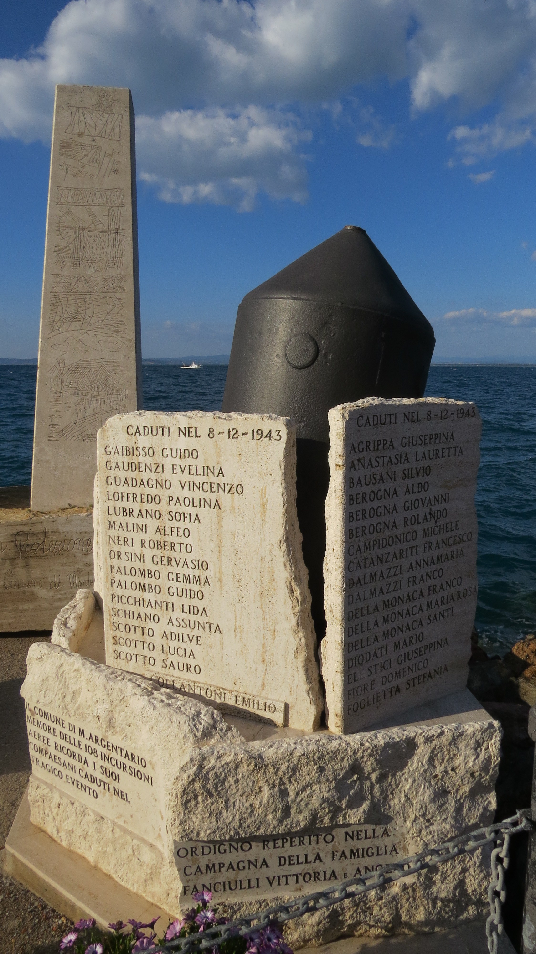 Monumento ai Caduti sotto i bombardamenti del 1943-1944, situato sul Lungomare dei Navigatori